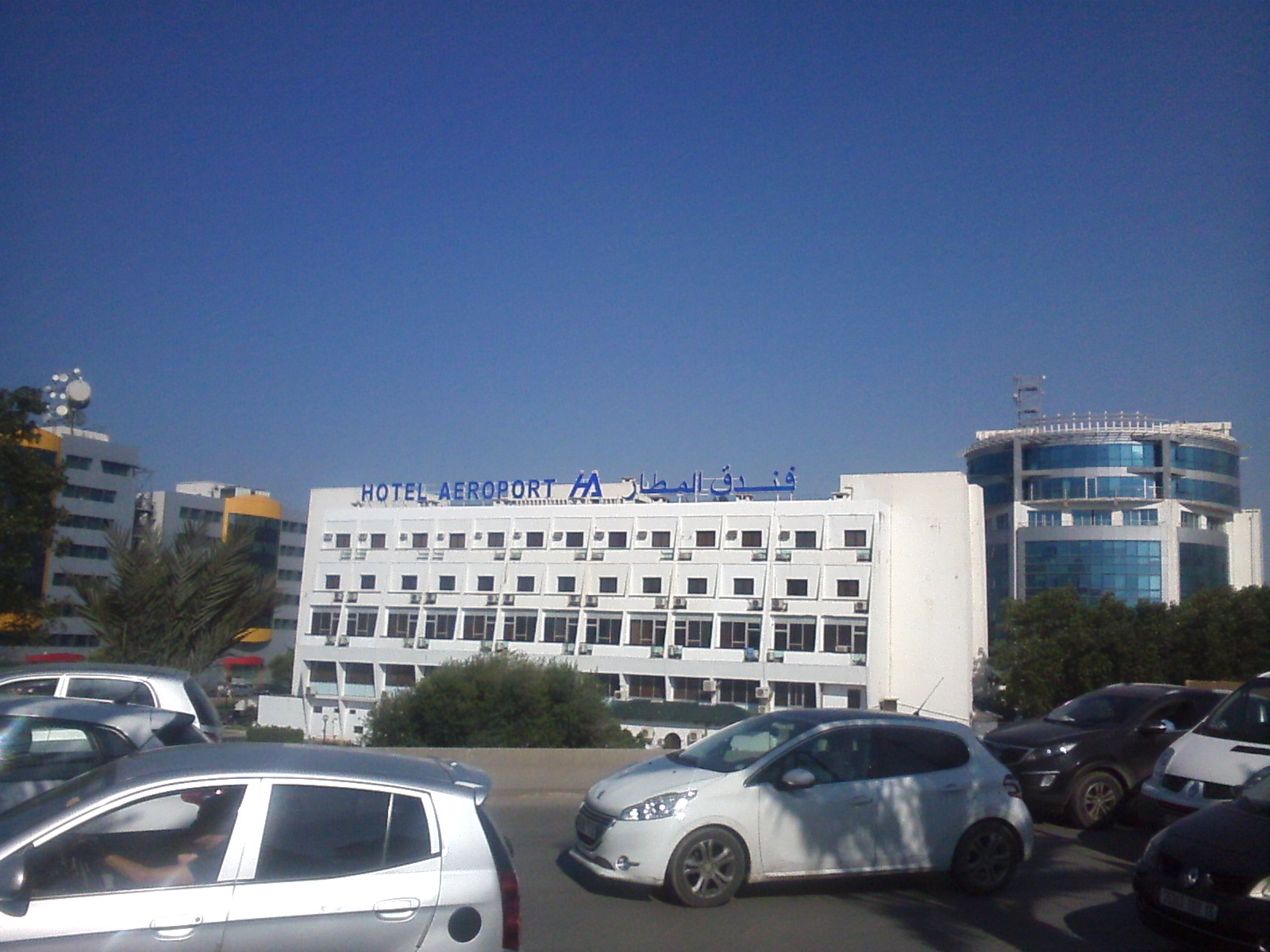 L'Hôtel Aéroport à Dar El Beida, Alger, Algérie.